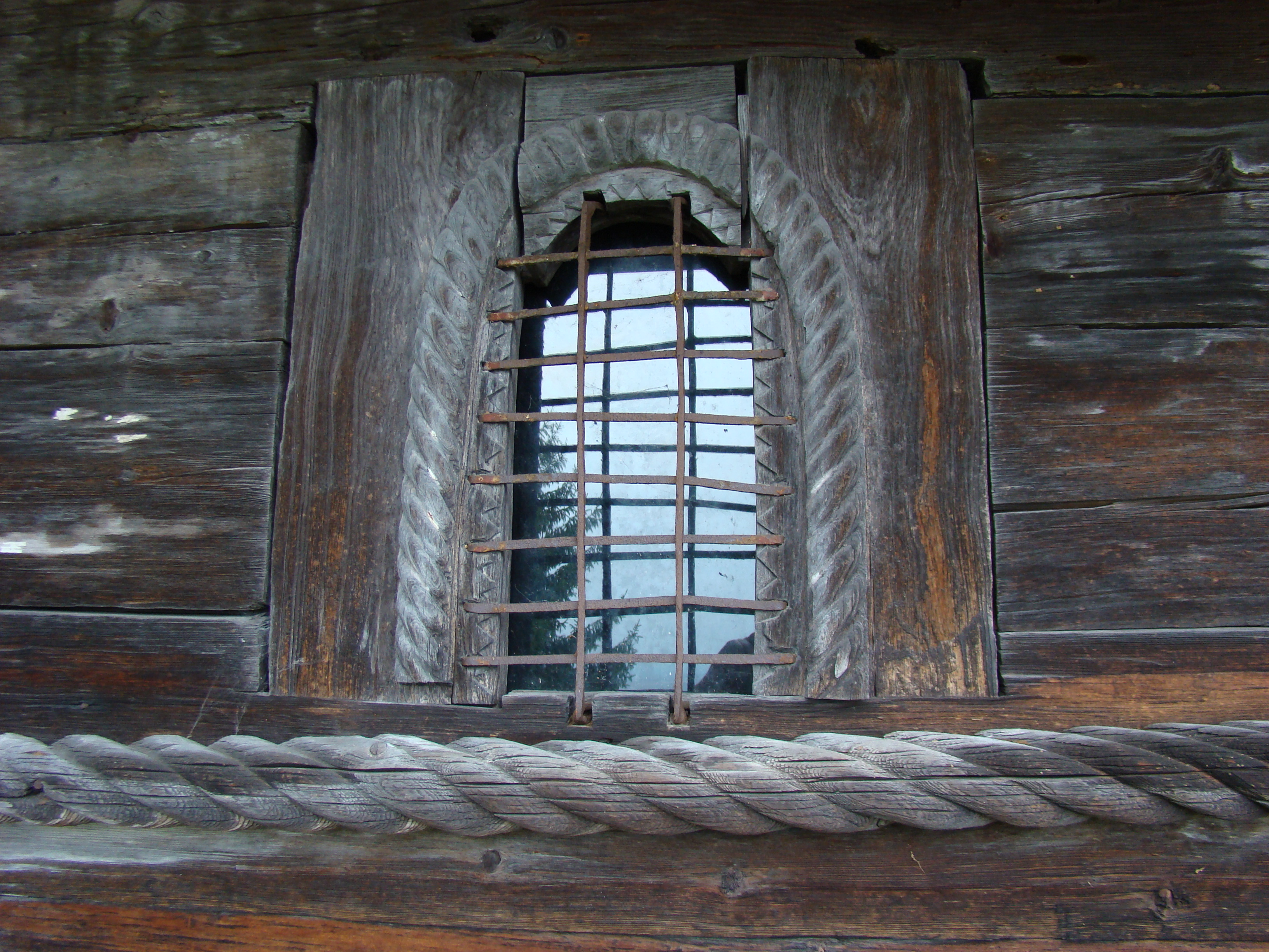 Biserica de lemn „Sf.Dumitru” din Schela-Cornet, județul Gorj